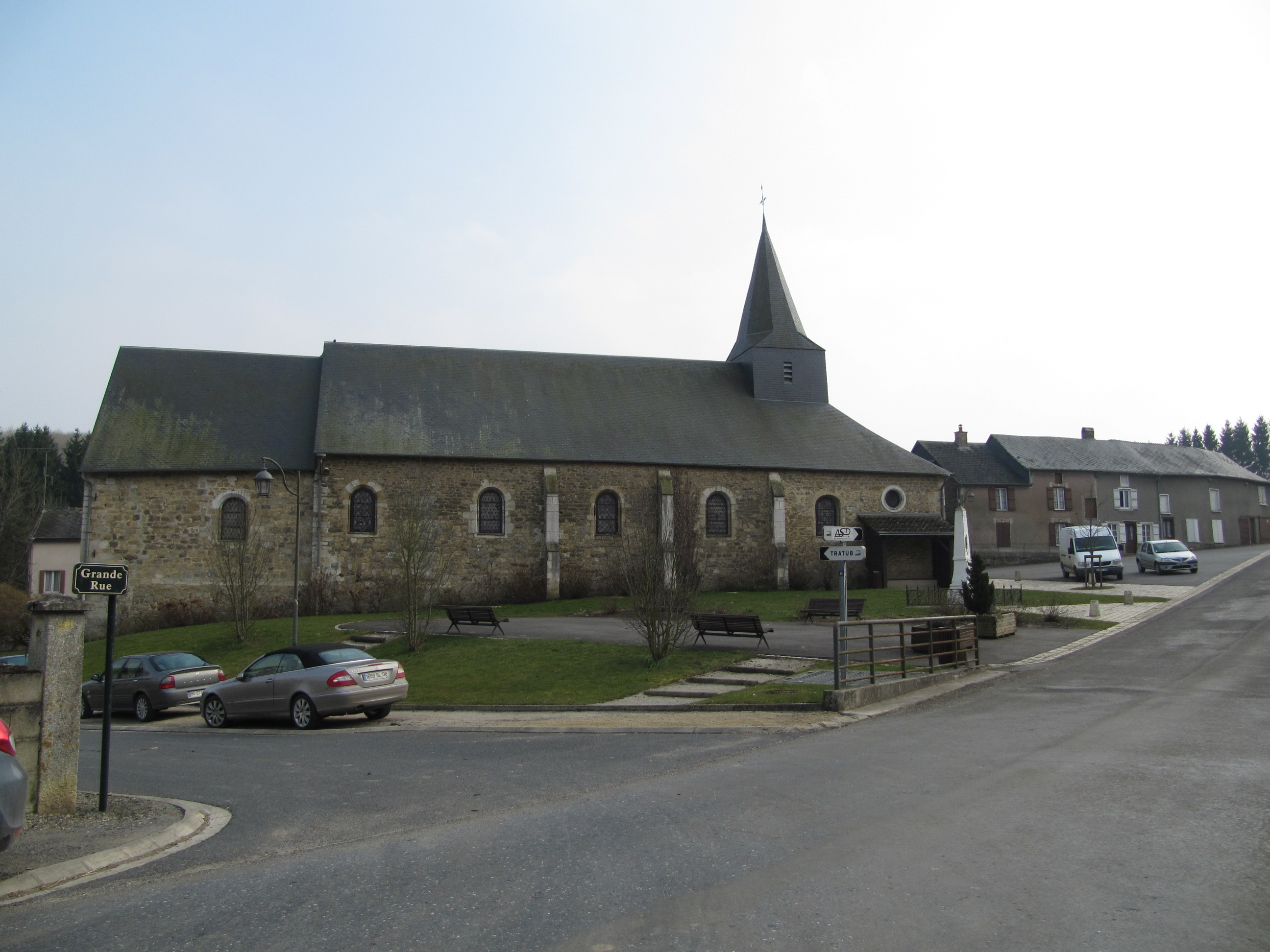 Eglise Lalobbe